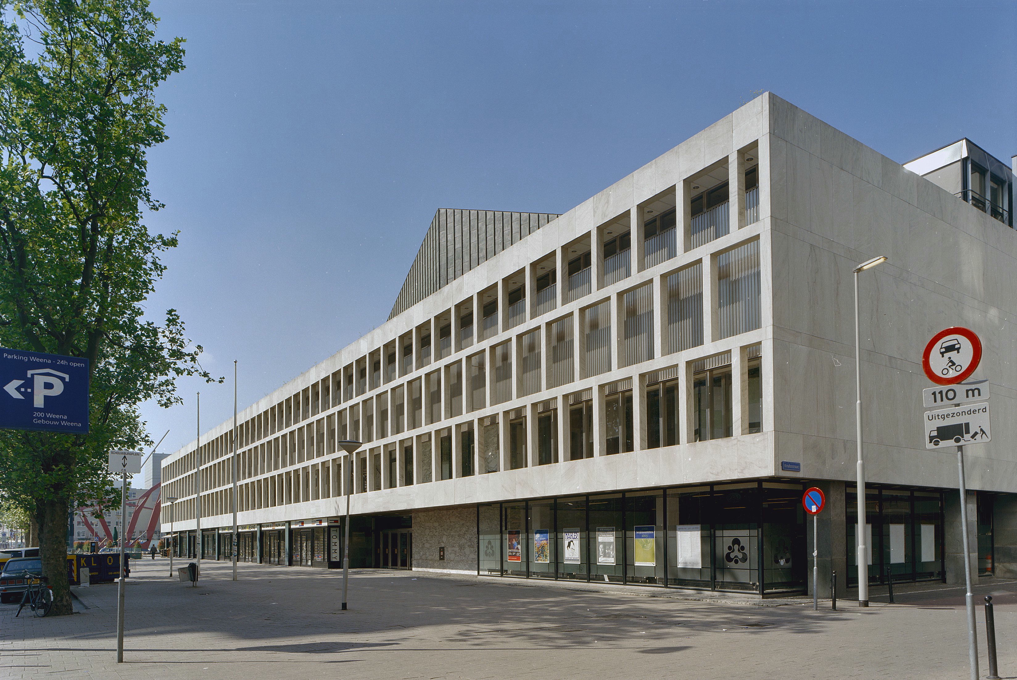 Concert- en congresgebouw De Doelen: Overzicht rechter zijgevel (opmerking: Gefotografeerd voor Toonbeelden van de Wederopbouw)